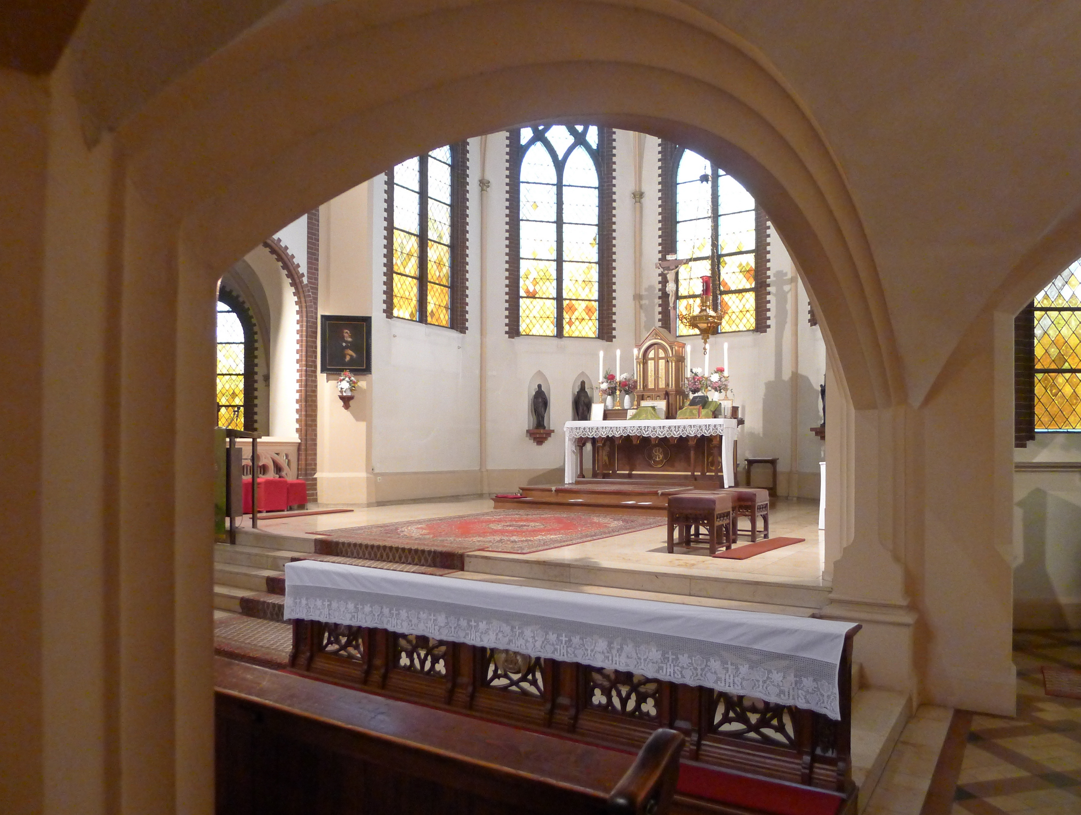 Hauptaltar im Chor